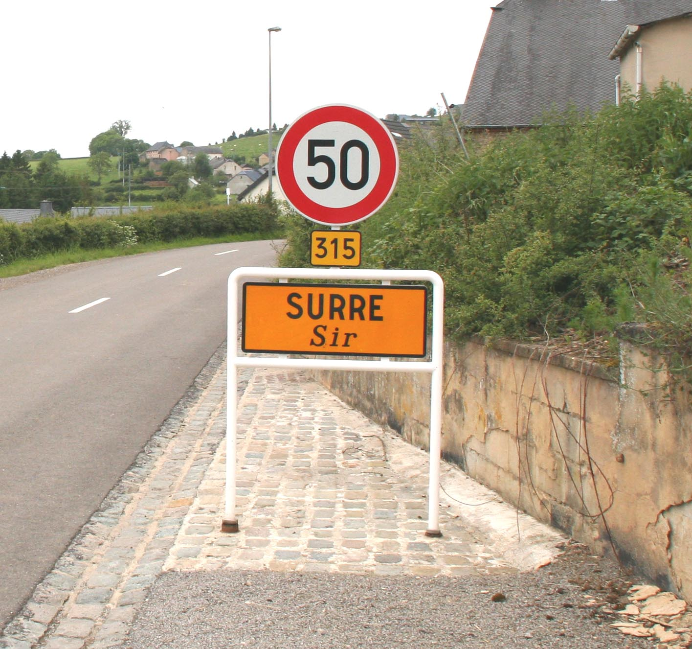 Sir Uertschaftsschëld. Kategorie:Gemeng Bauschelt